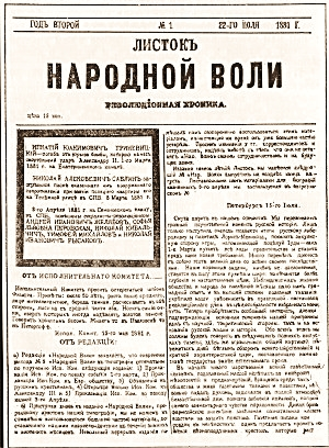 Primo numero del "Listok' Narodnoj Voli"(Il foglio volante di Narodnaja Volja).